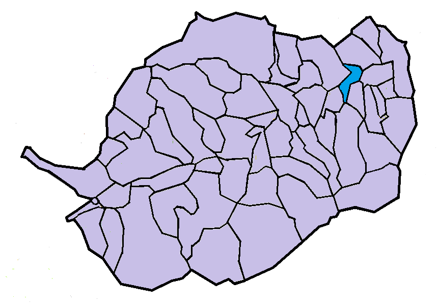 Marqueixanes en el Conflent, a partir del mapa municipal del Conflent de lliure disposició adaptat al Nomenclàtor toponímic aprovat el 2007